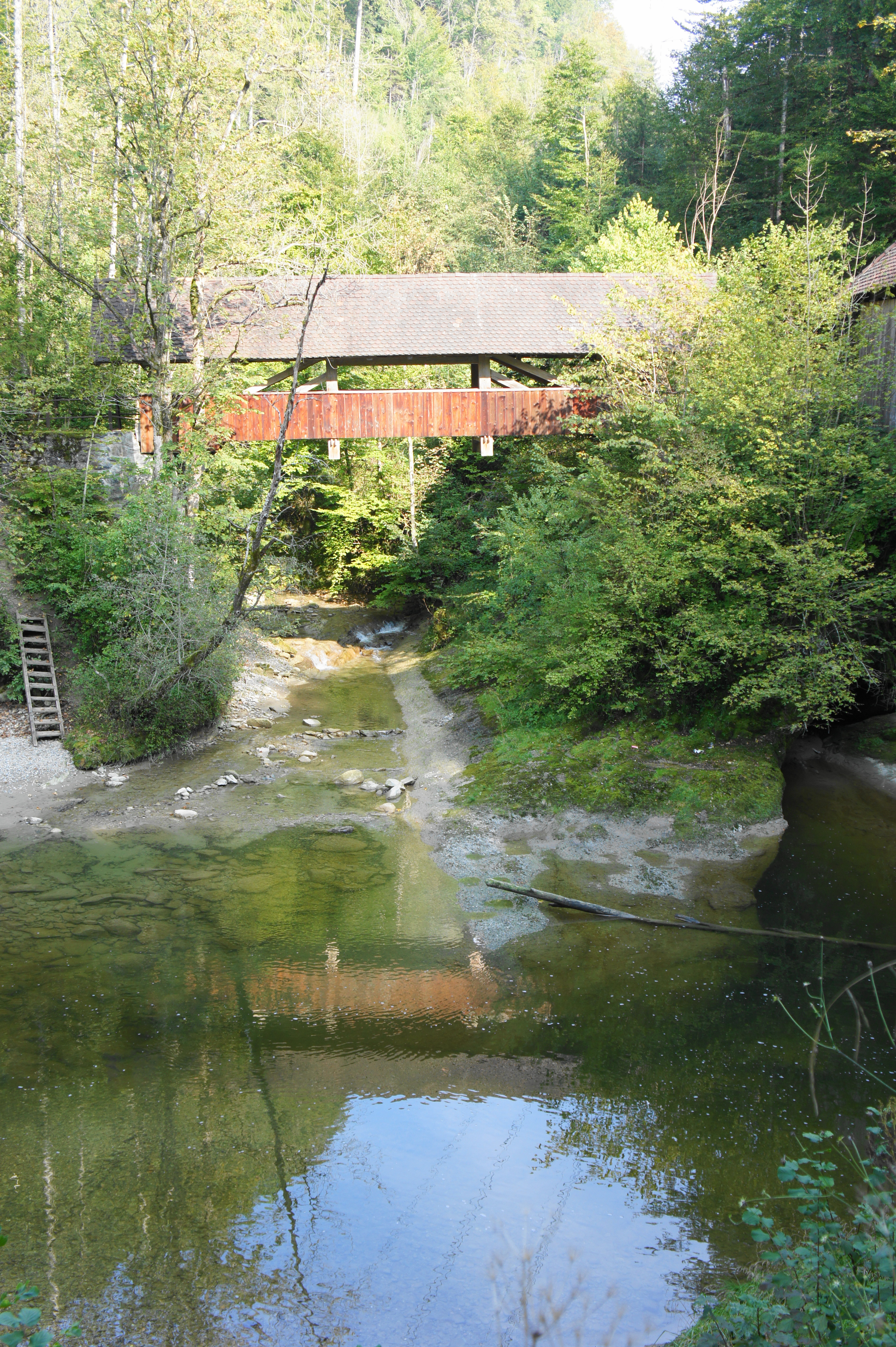 Blick aus Westen auf die gedeckte Holzbrücke über den Wattbach, der an dieser Stelle in die von rechts kommende Sitter mündet.